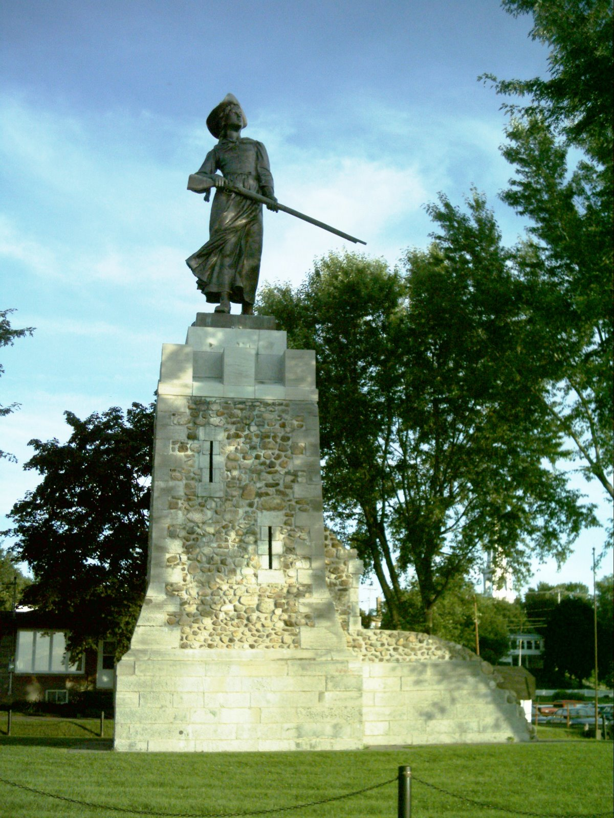 À Verchères, monument en l'honneur de Madeleine de Verchères Érigé en 1927 Le bronze est signé: P. Hébert